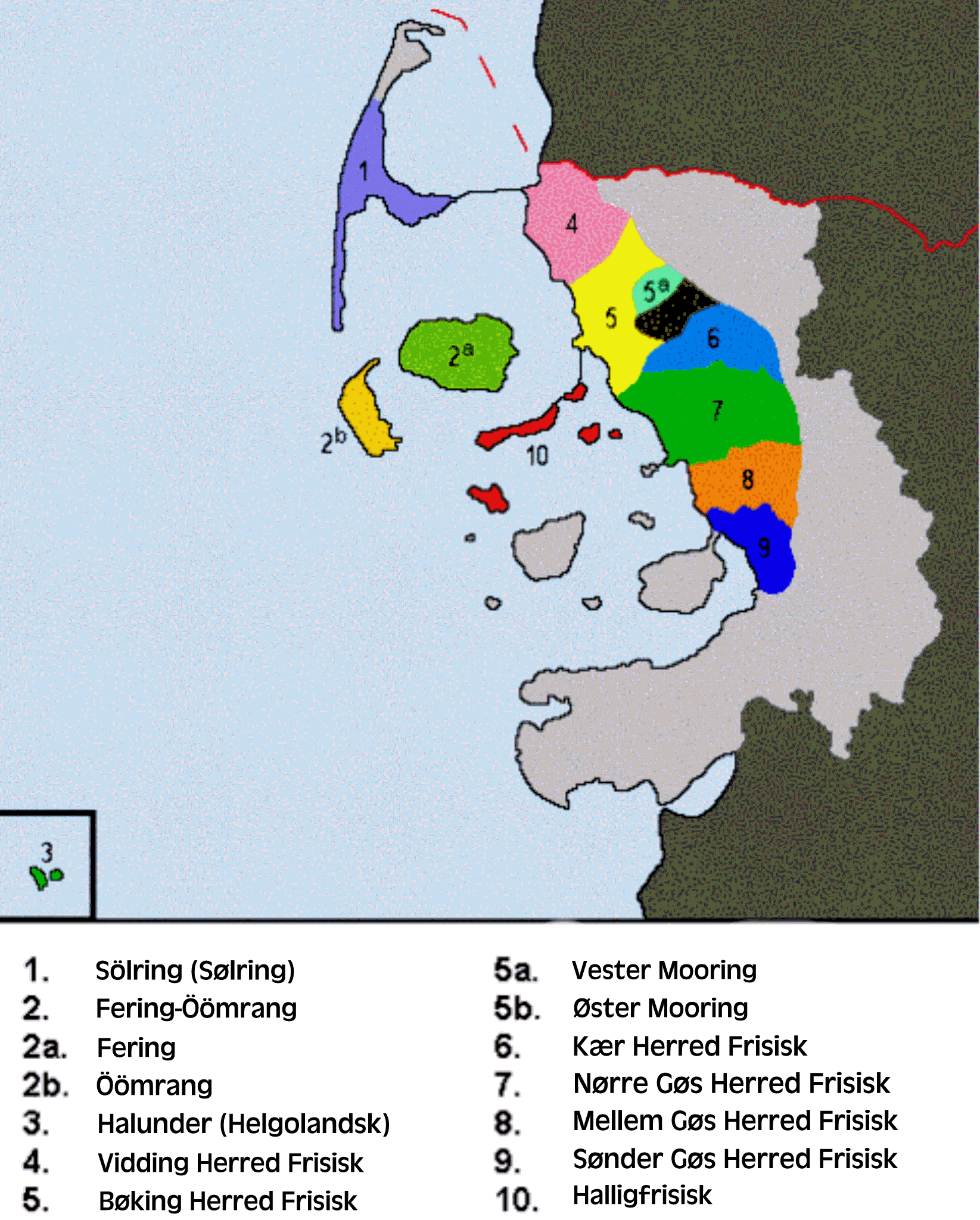 Kort over de nordfrisiske dialekter